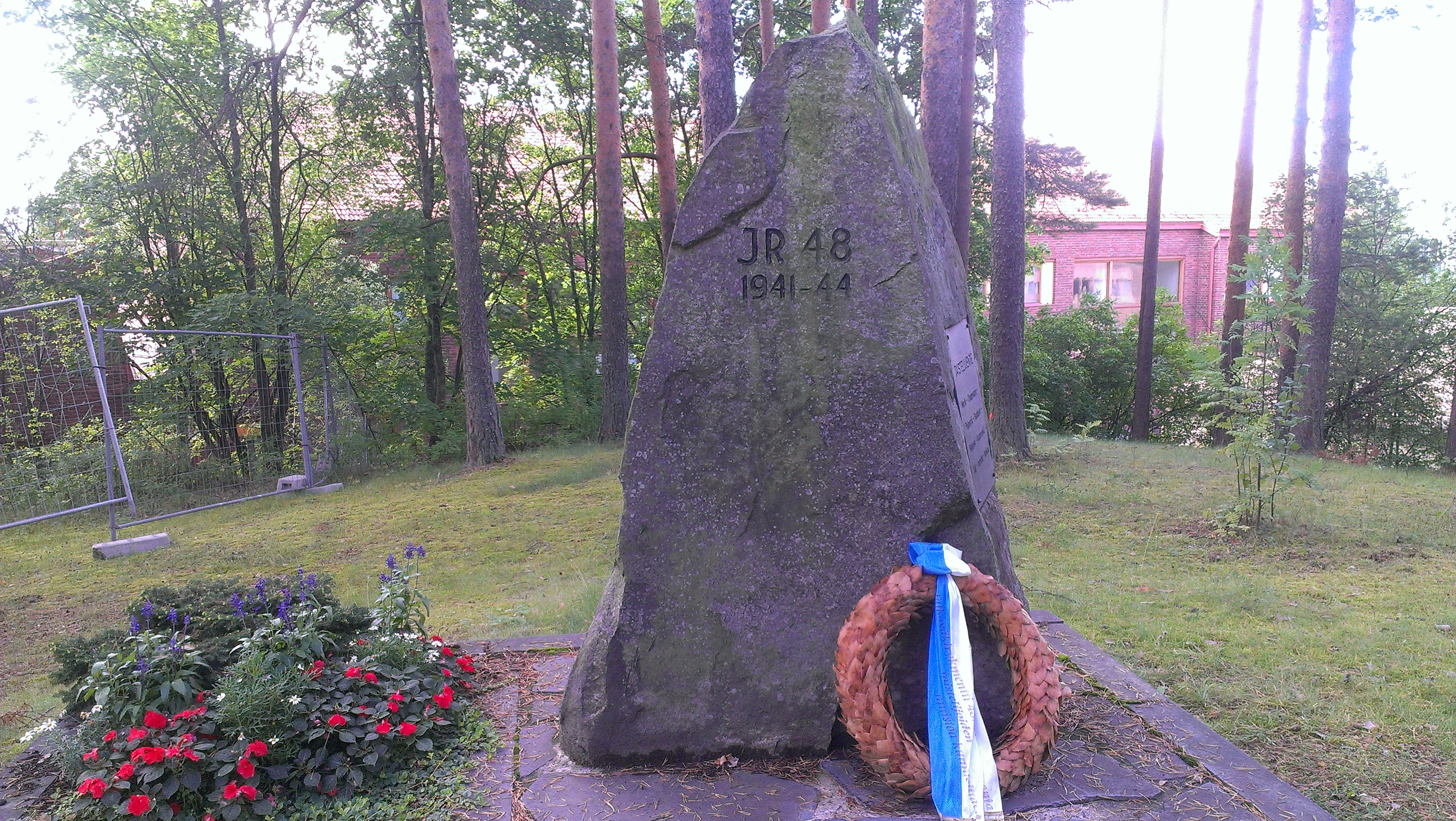 Jalkaväkirykmentti 48:n muistokivi Jyväskylän yliopiston Seminaarinmäen kampuksella